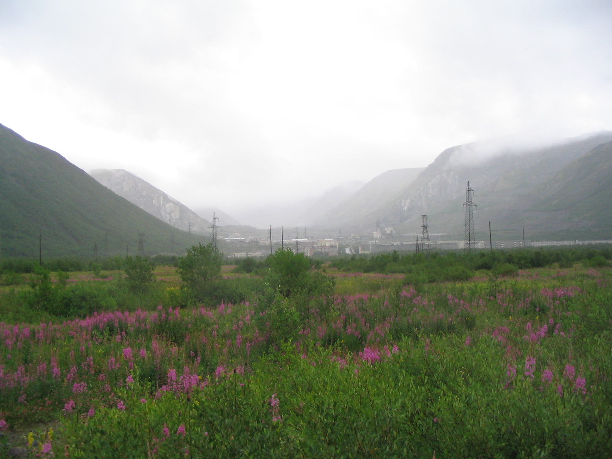 Кировск: вид от озера Малый Будъявр. Фотография города Кировск Мурманской области (Российская Федерация).